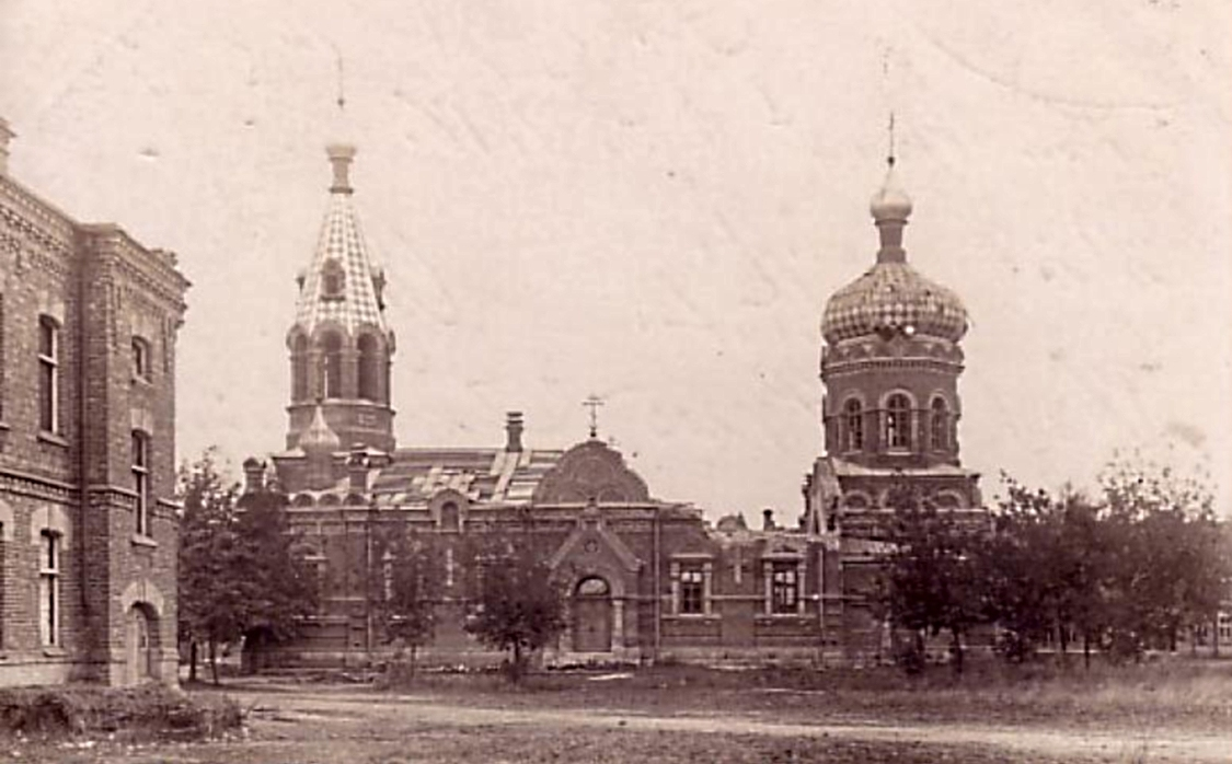 Nieistniejąca cerkiew garnizonowa św. Aleksandra Newskiego w Przasnyszu, 1912 r.